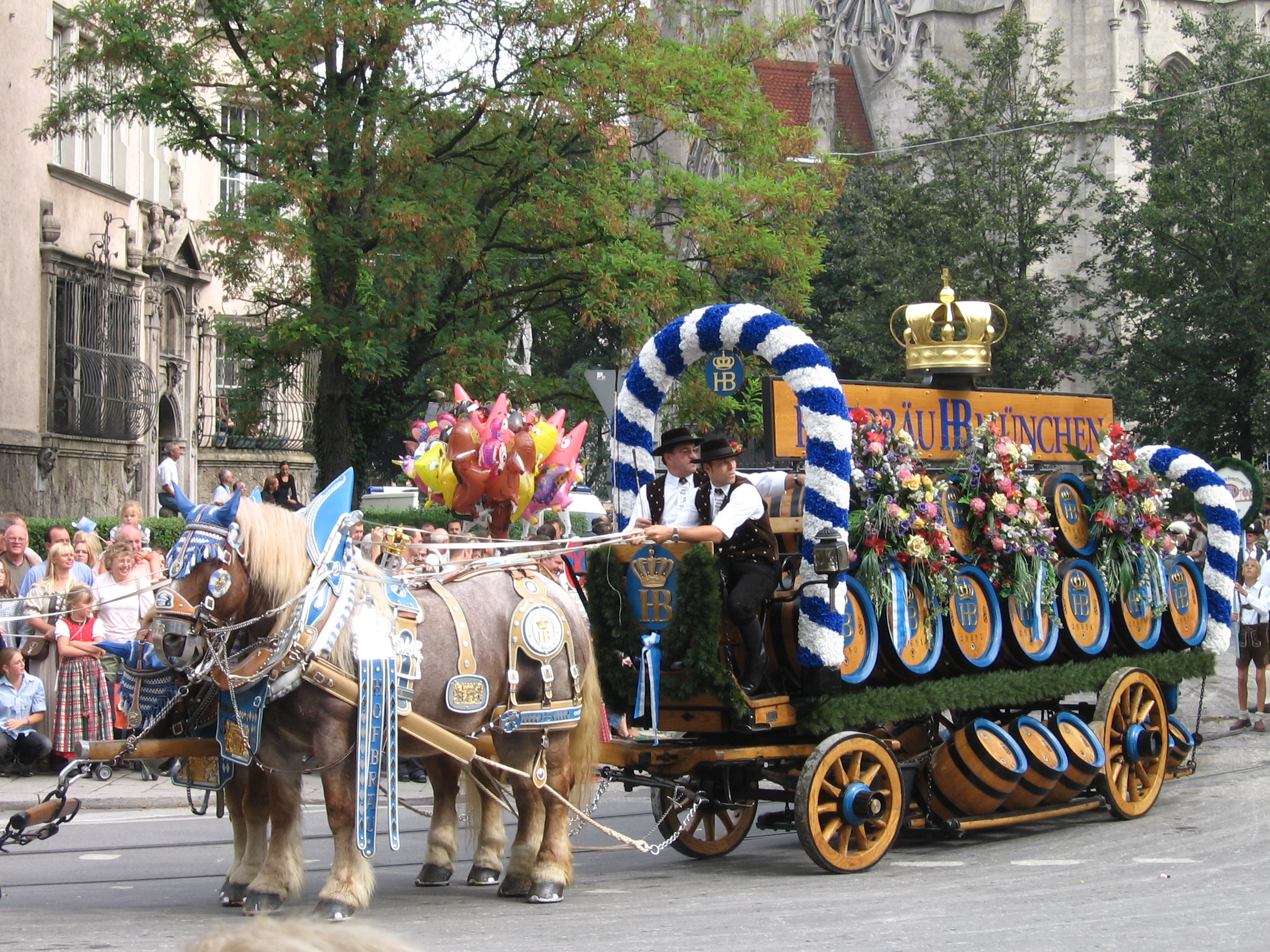 Oktoberfest - Deschidere festivǎ - detaliu.